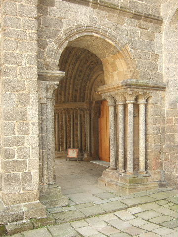 Třebíč: Portal der St.-Prokop-Basilika (2009)